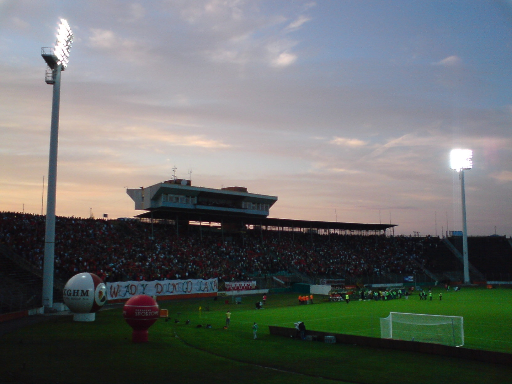 Stadion Zagłębia Lubin podczas meczu / Stadium of Zagłębie Lubin during match